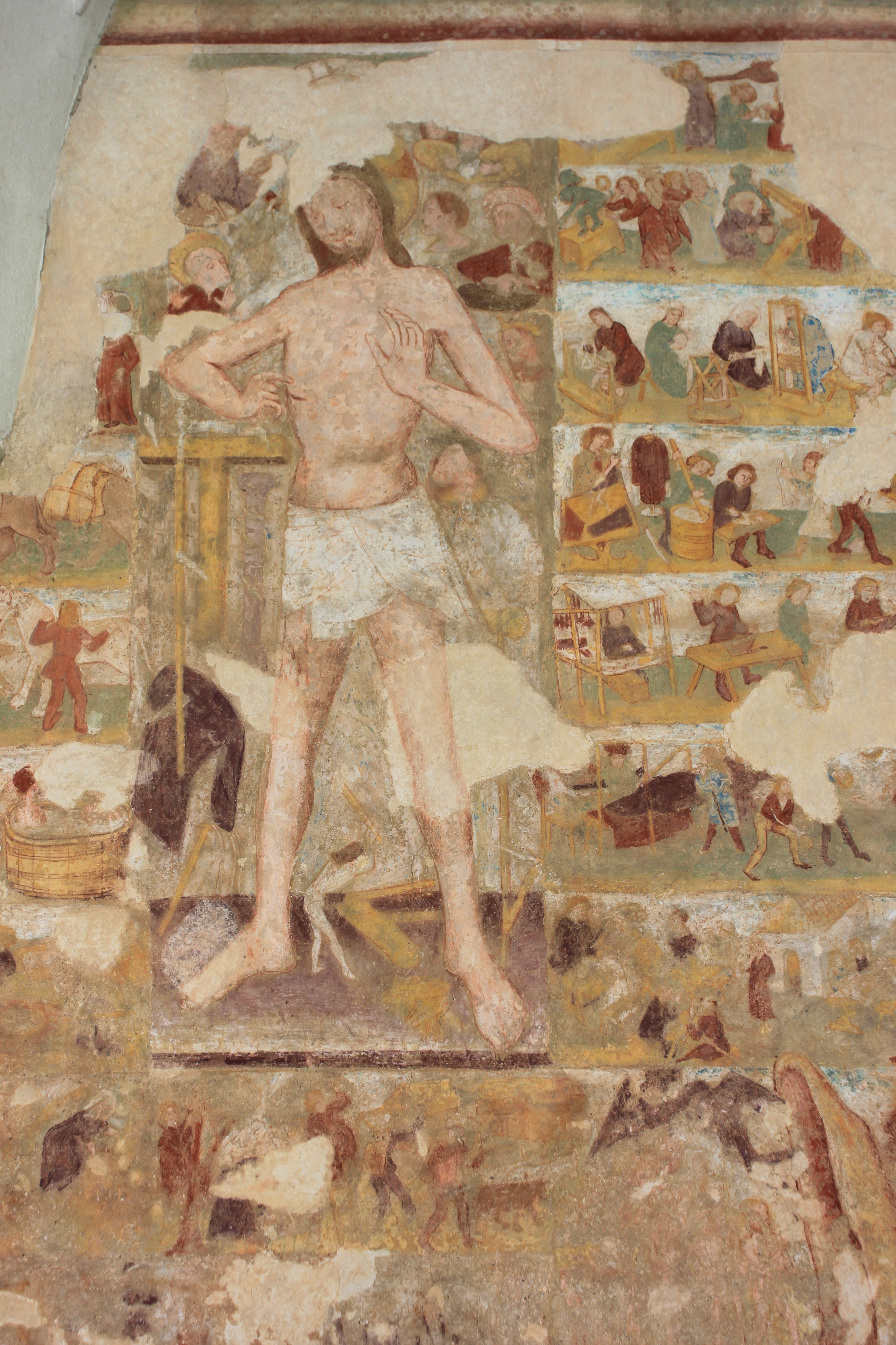 Fresko „Der Heilige Sonntag“, 1450; gemalt von Johannes von Laibach, an der Westseite der Kirche.